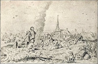 Kartoffelfeuer. Federzeichnung, angefertigt mit Sicht auf die Kirche zu Plauen bei Dresden